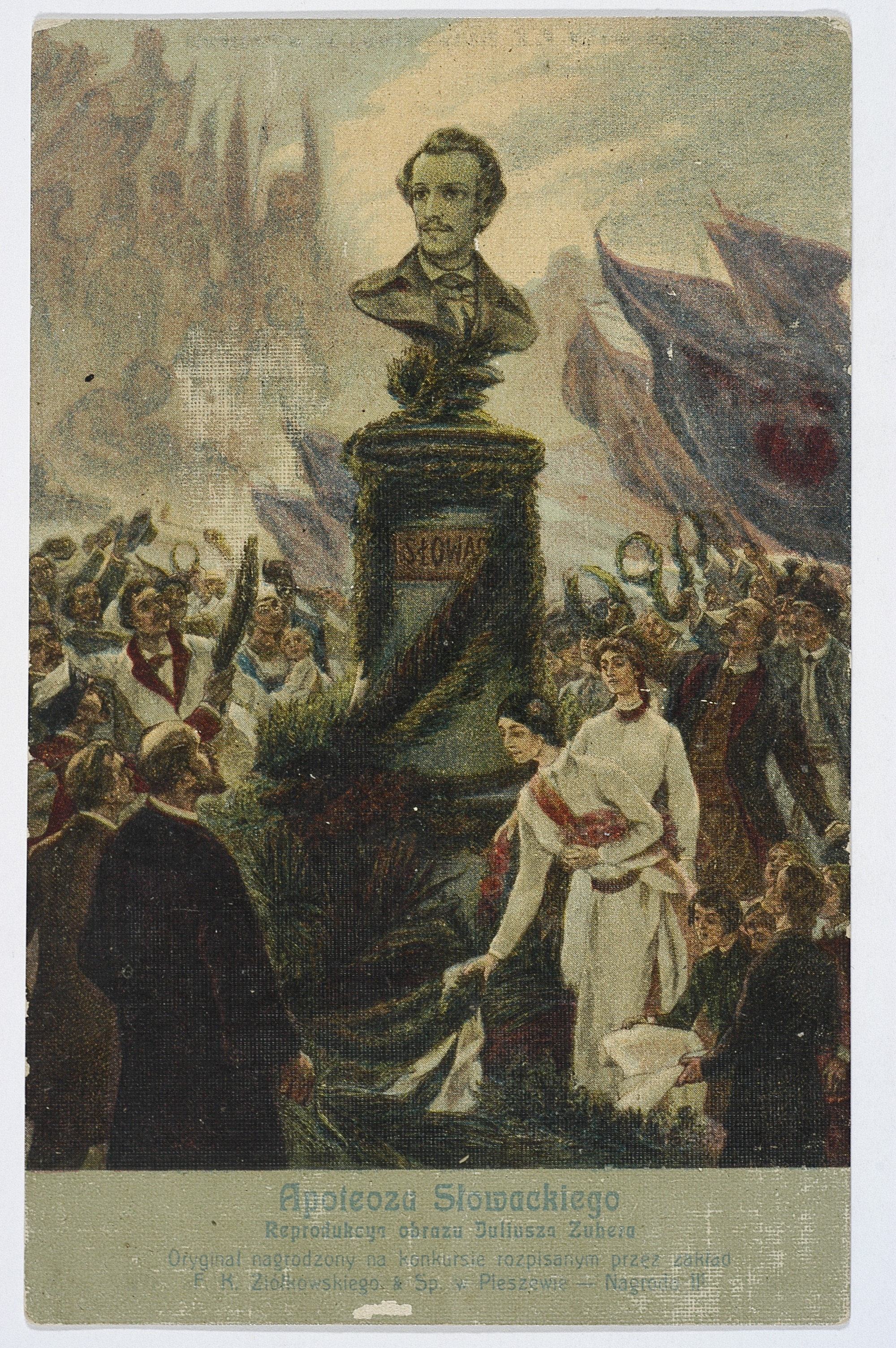 Apoteoza Słowackiego, reprodukcja obrazu Juliusza Zubera na pocztówce wyd. w latach 1910-1930